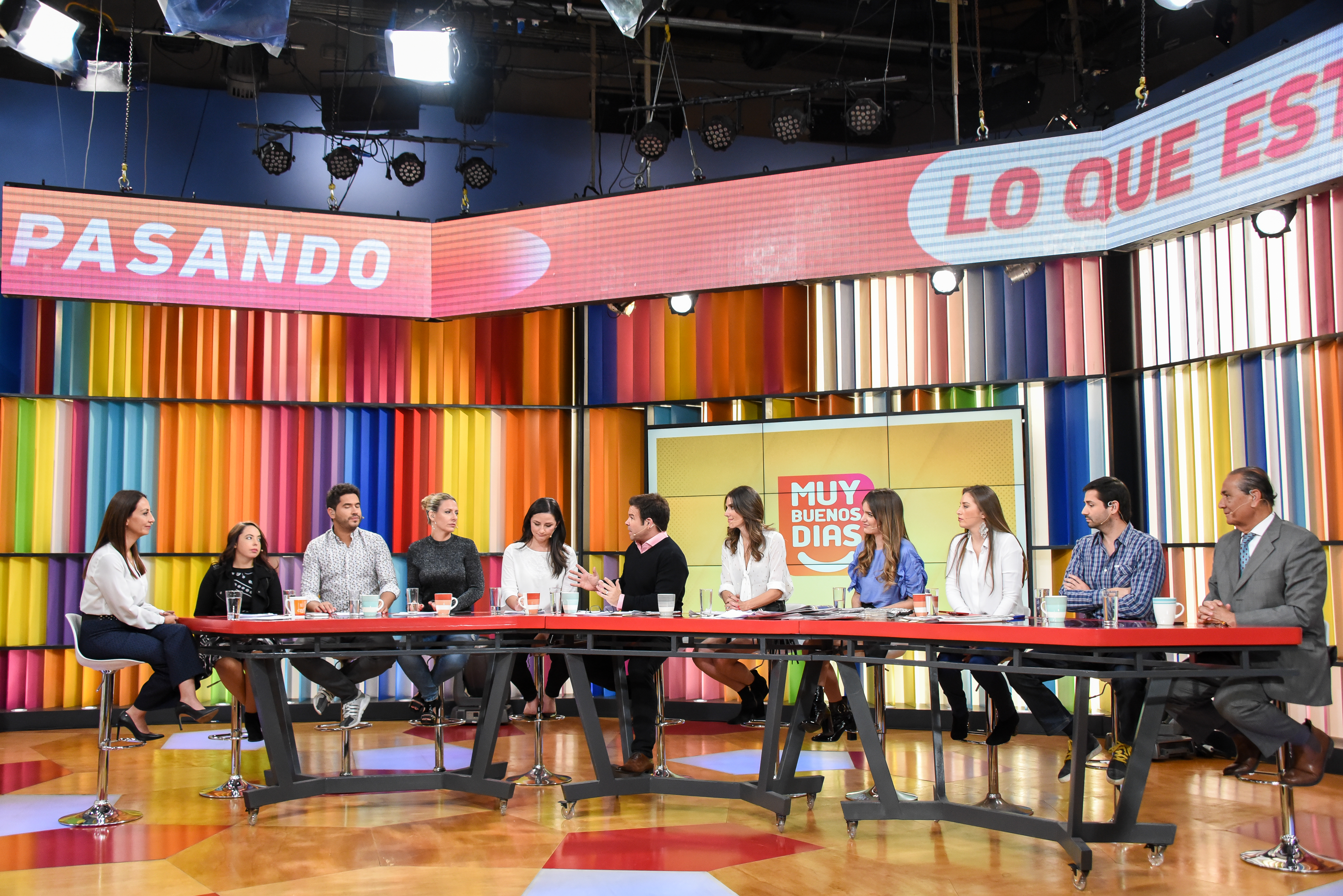 Cecilia Pérez visita programa Muy buenos días de TVN.